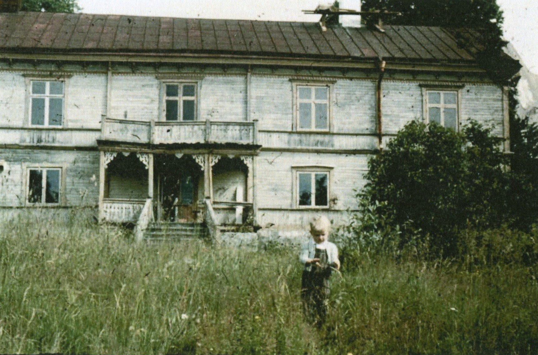 Sjöviks gård före renoveringen